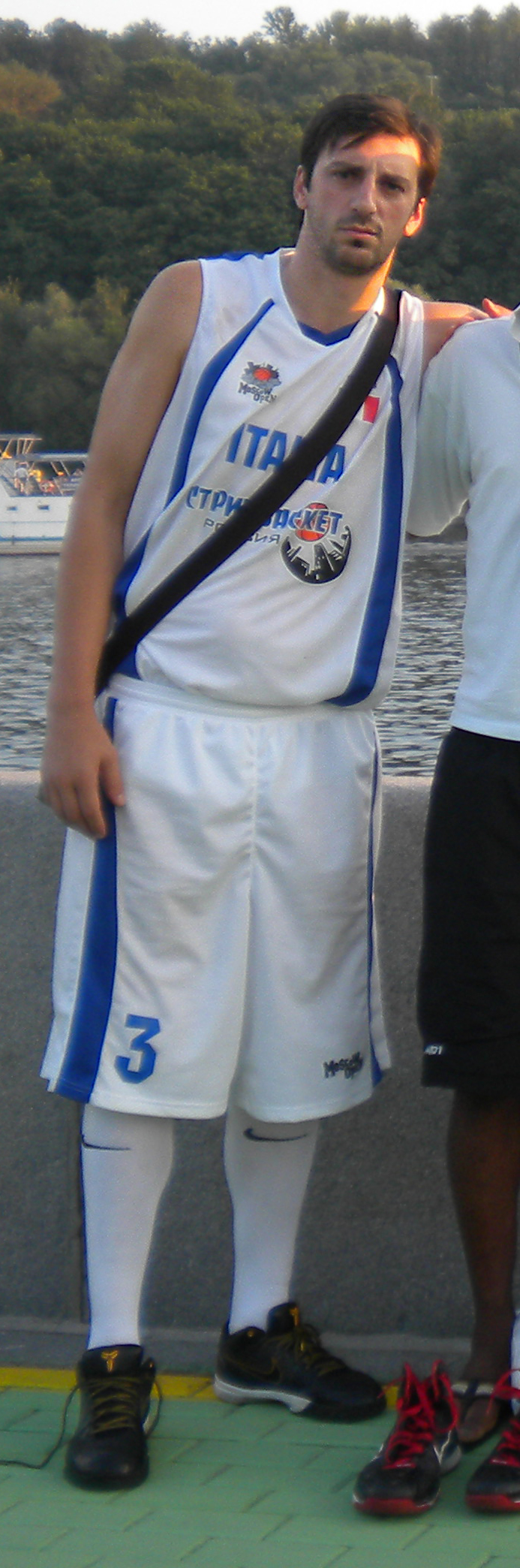 Klaudio Ndoja